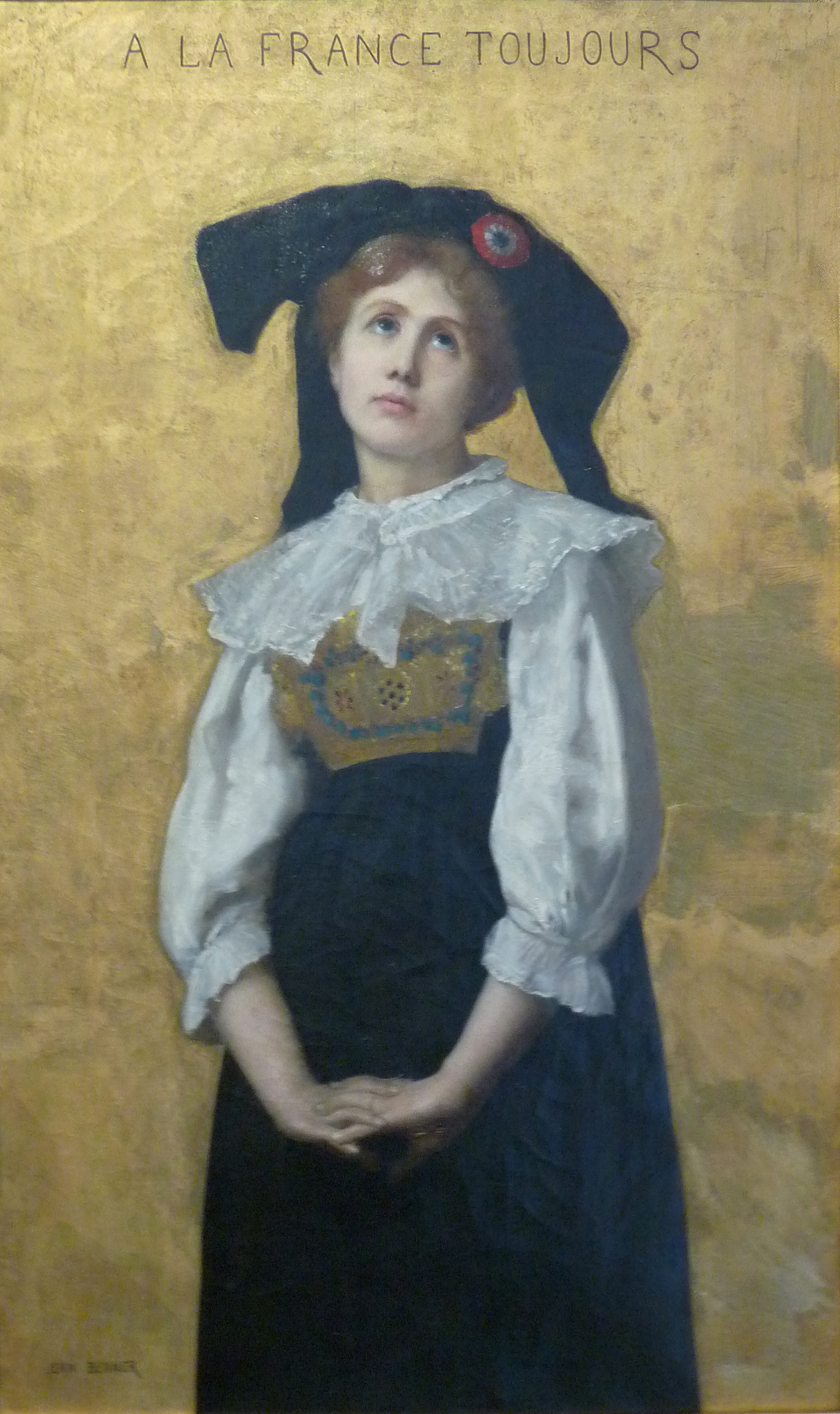 A la France toujourstitle QS:P1476,fr:"A la France toujours" label QS:Lfr,"A la France toujours"